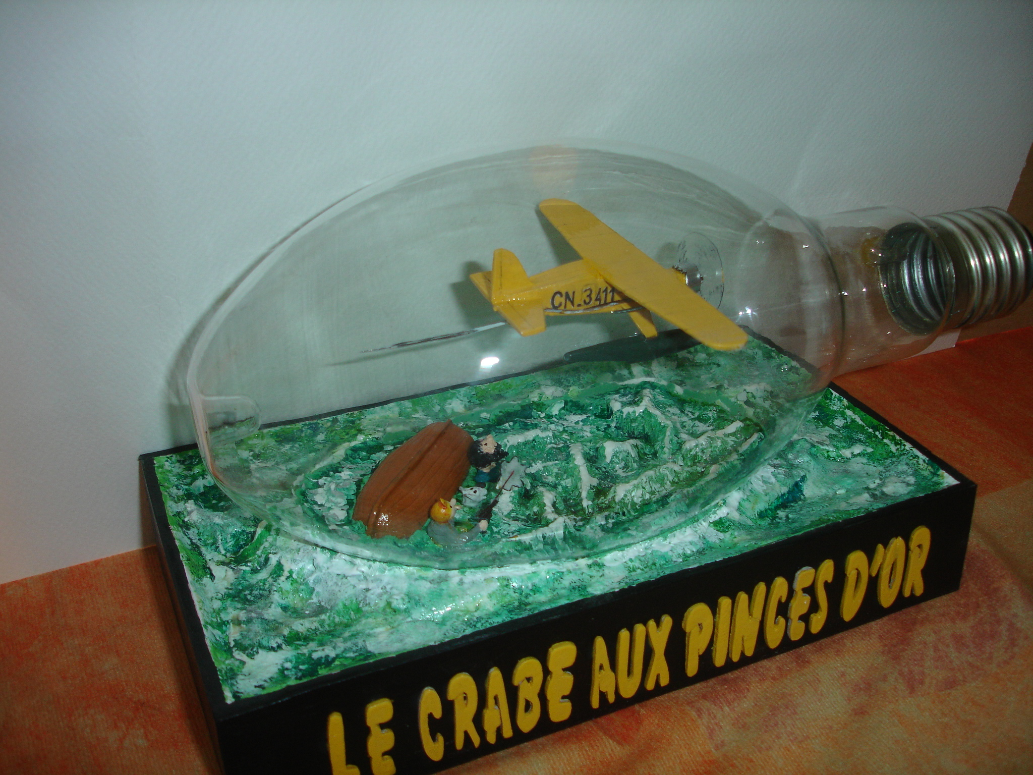 Szene aus dem Tim-und-Struppi-Band Die Krabbe mit den goldenen Scheren: Tim schießt auf das Wasserflugzeug einer Verbrecherbande. Modell in einer zur Geduldsflasche umfunktionierten Glühbirne